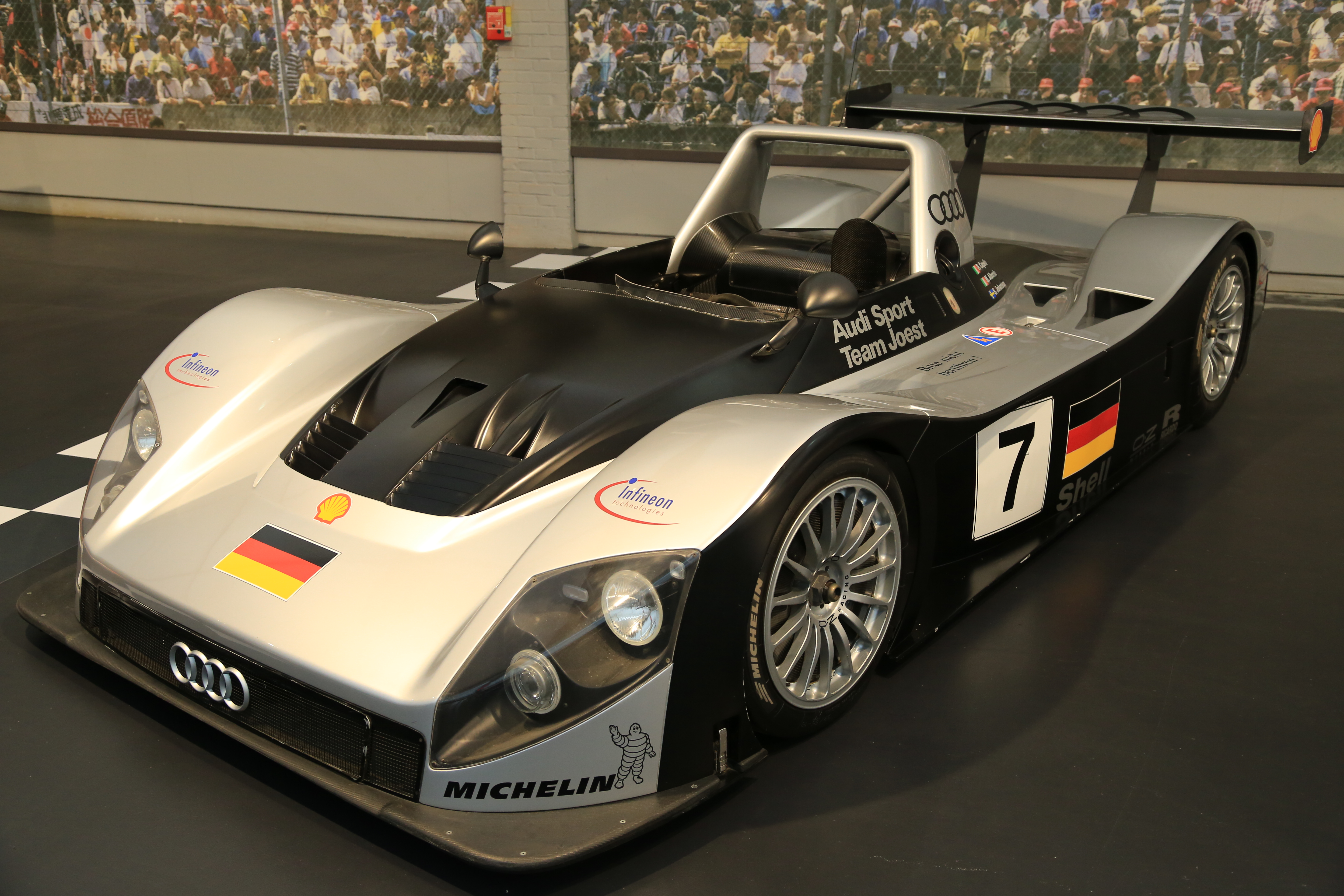 Musée de l'automobile - Mulhouse - Audi - BH5A5973